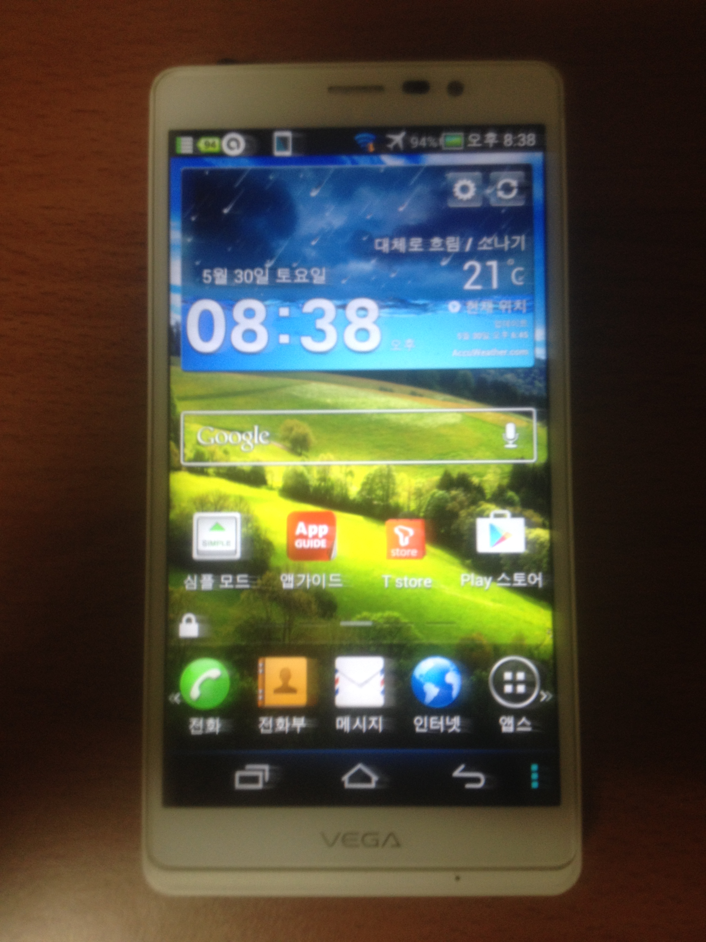 SKT 베가R3의 홈 화면이다.